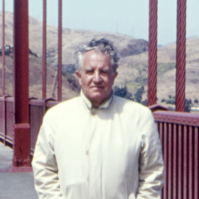 Max Bense auf der Golden Gate Bridge in San Francisco